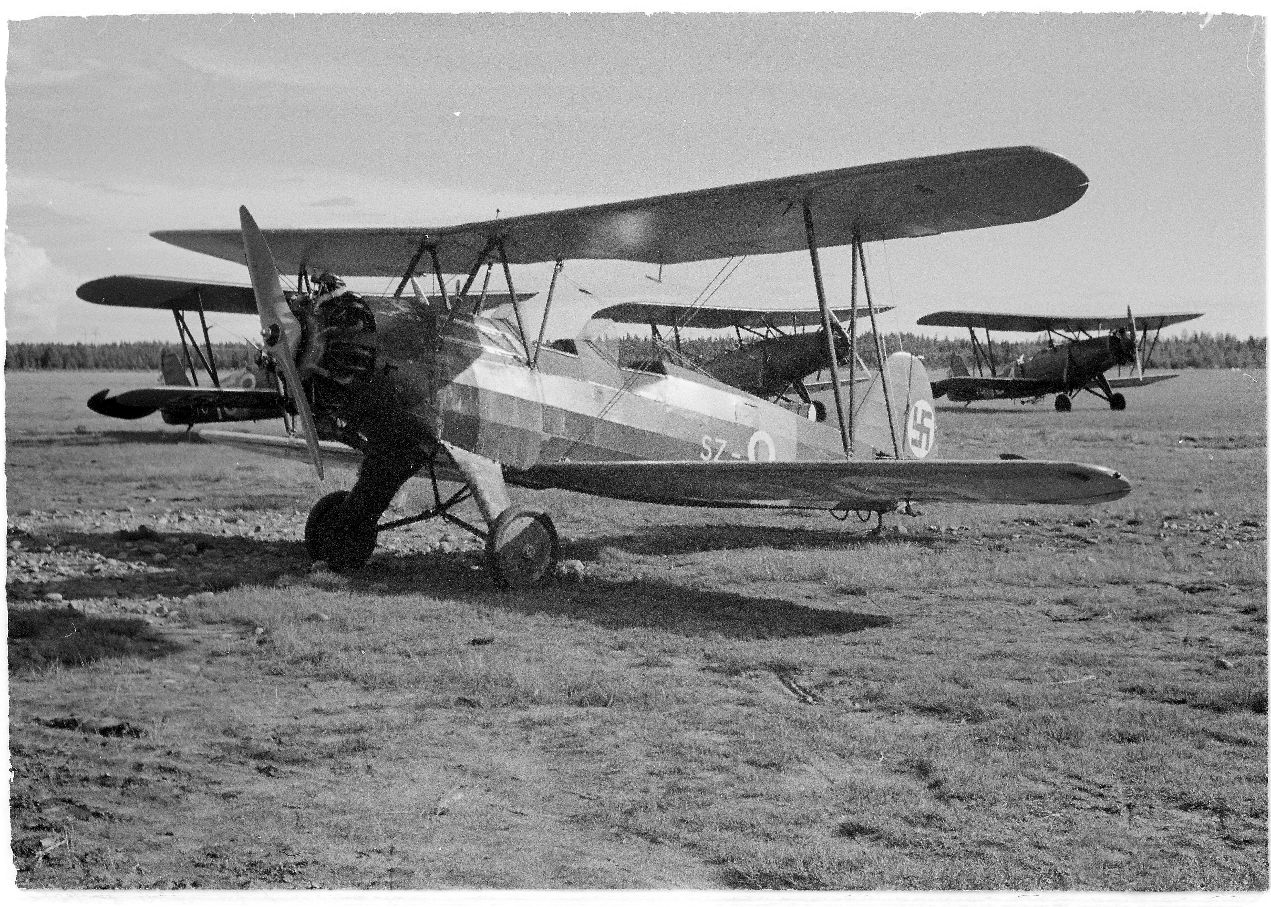 Harjoituskone Stieglitz, tyyppikuvat. (Kuvassa on Focke-Wulf Fw 44 Stieglitz). Kuvauspaikka: Laajalahti